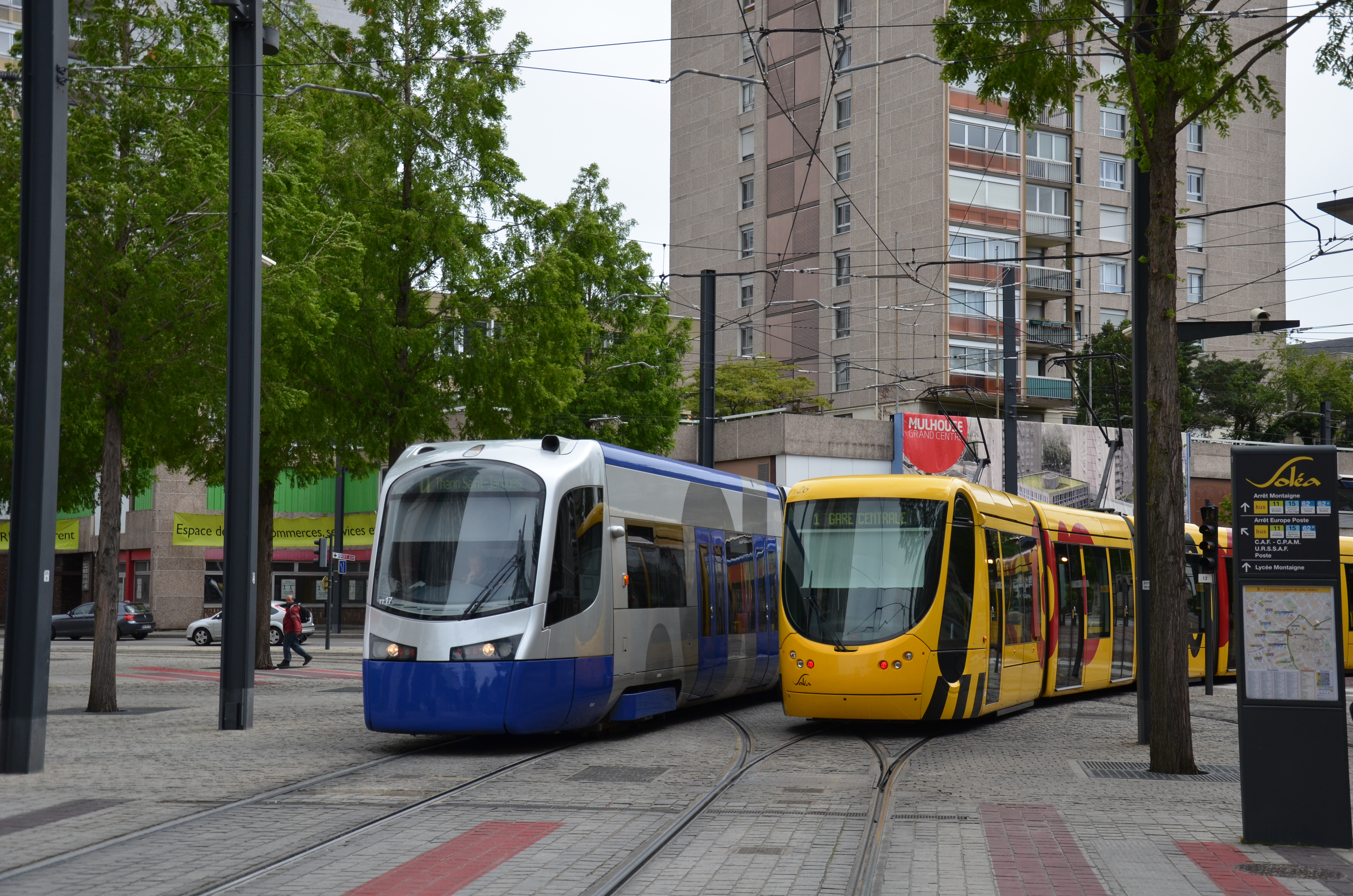 Siemens Avanto U25500 TT17 SNCF et Alstom Citadis 302 n°2026 Soléa baptisée « Feldkirch » à la station Porte Jeune, à Mulhouse.